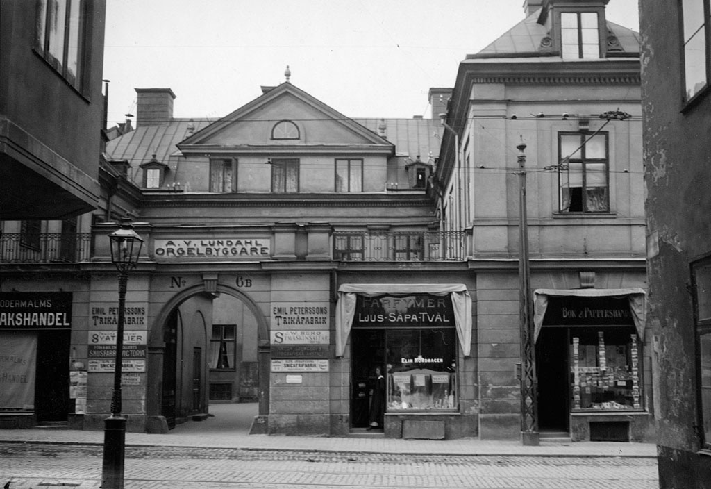 The Leijonstedt House and shops in Sankt Paulsgatan street in the southern part of Stockholm city. Leijonstedtska huset och butiker på Sankt Paulsgatan på Södermalm. Parish (socken): Stockholm Province (landskap): Södermanland Municipality (kommun): Stockholm County (län): Stockholm Photograph by: Unknown Date: 1890s Format: Print Persistent URL: Read more about the photo database (in english)